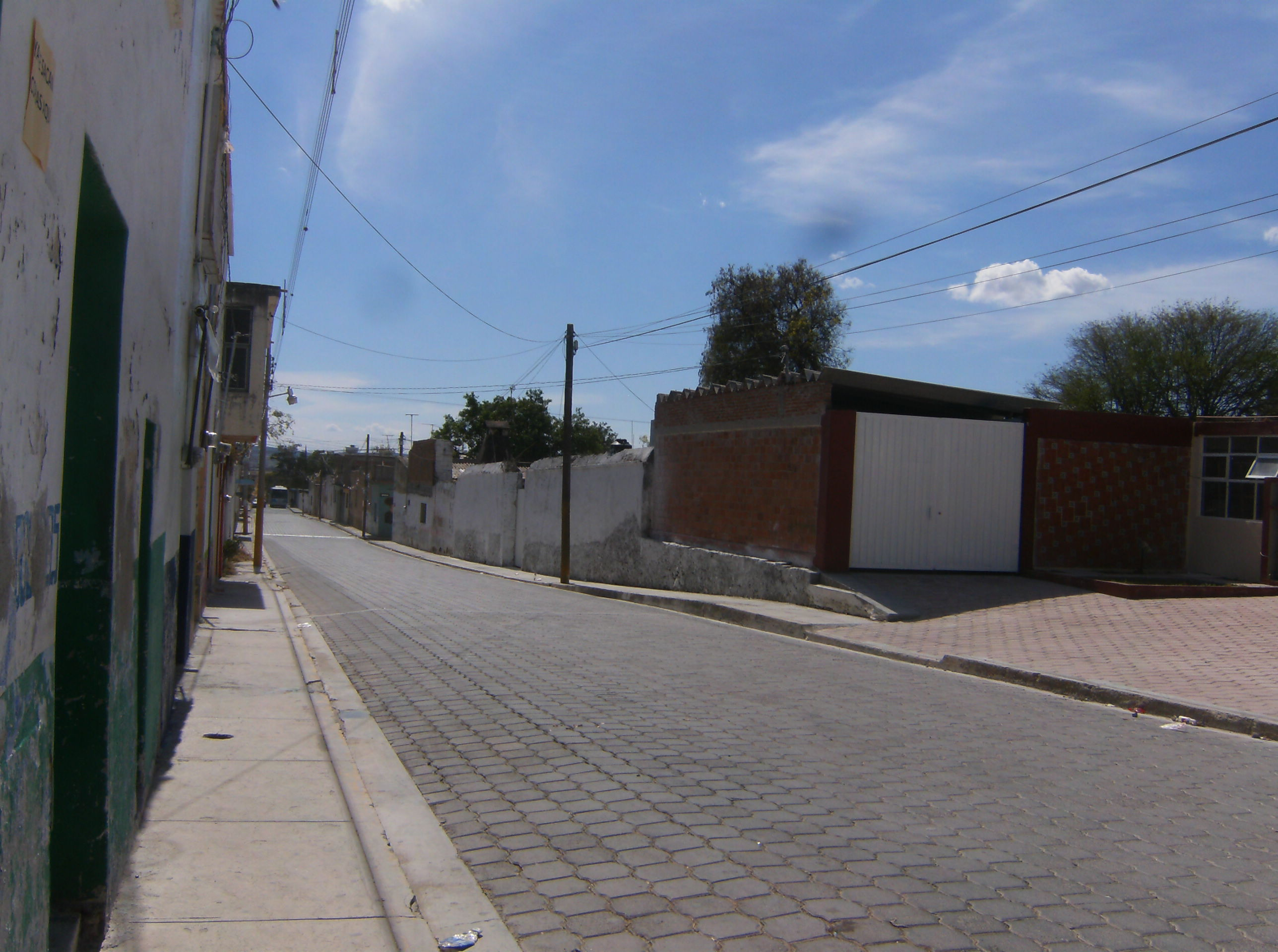 San Juan Ixcaquixtla, Pue.